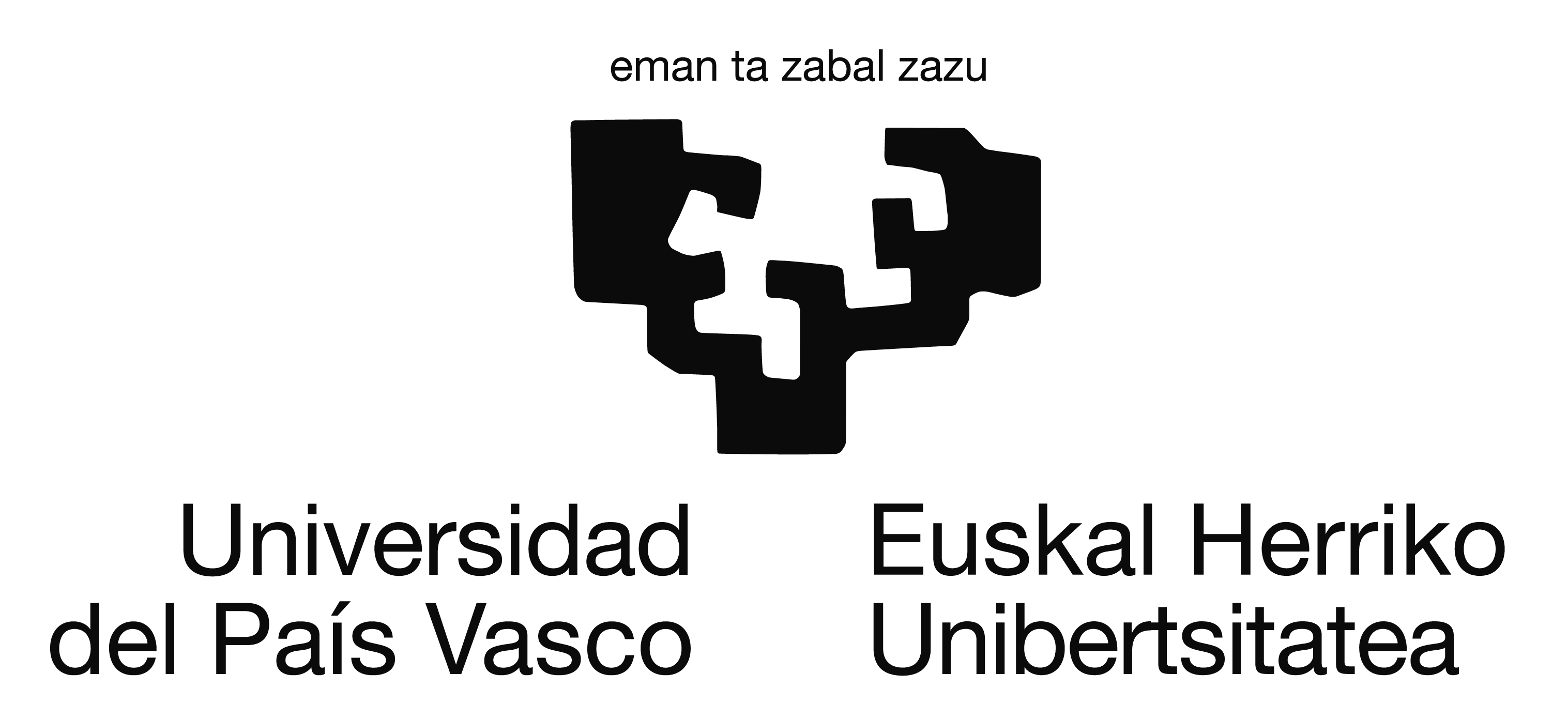 Euskal Herriko Unibertsitatea